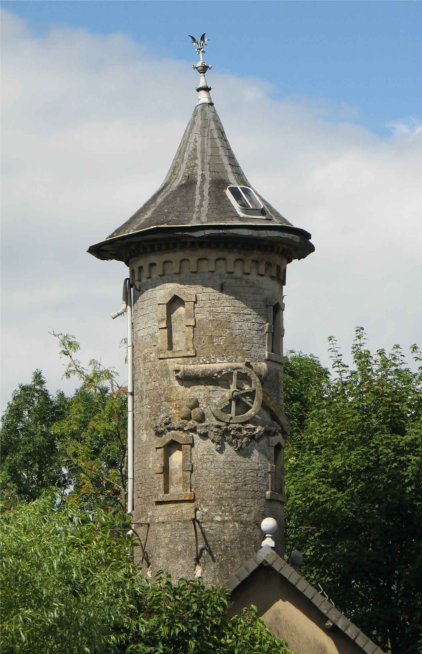 La tourelle de Kehlen (Luxembourg)